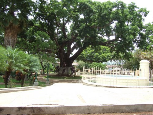 Parque hubicado en el Bº La Unión Frente a Parroquia "Sagrada Familia" Turín.